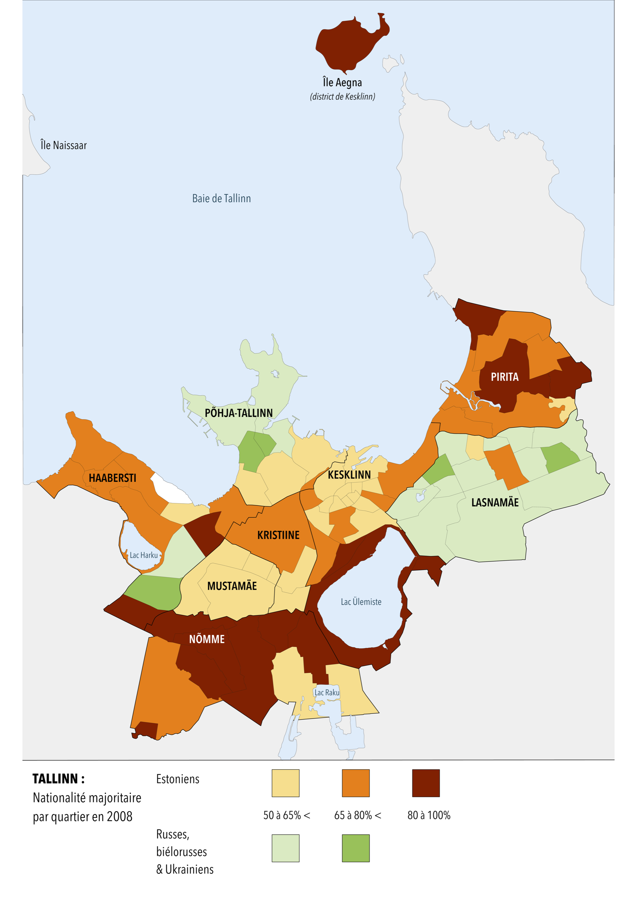 Proportion d'habitants de nationalité estonienne ou russe-biélorusse-ukrainienne par quartier en 2008